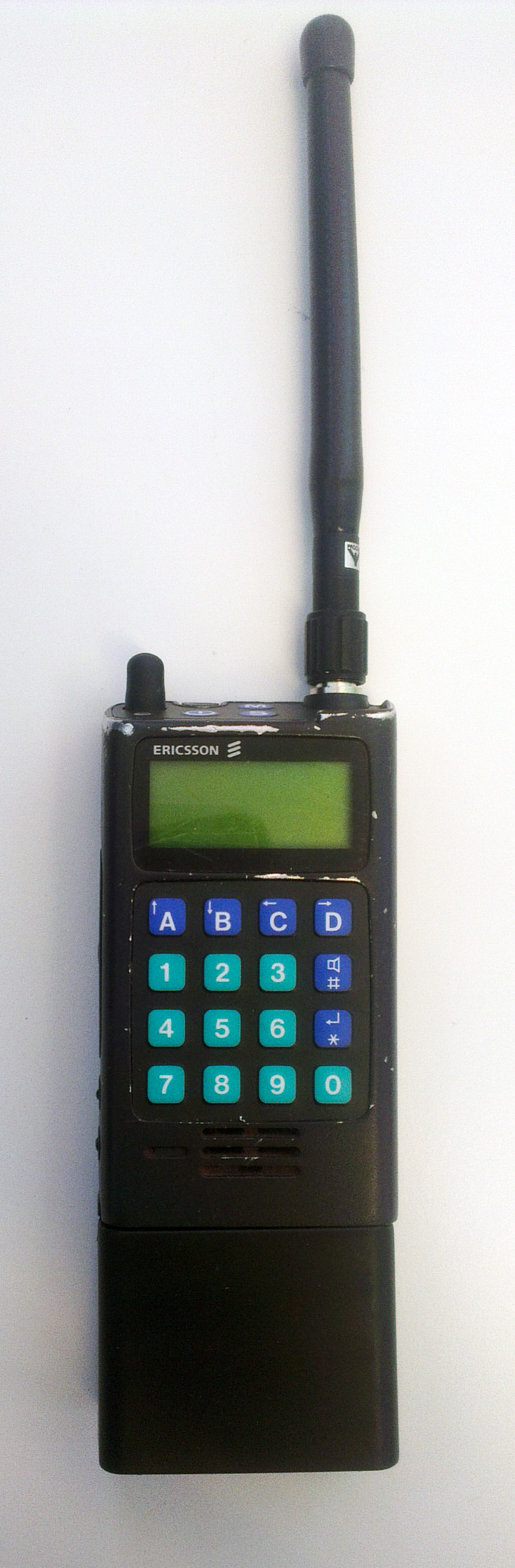 Ericsson P504 VHF radio